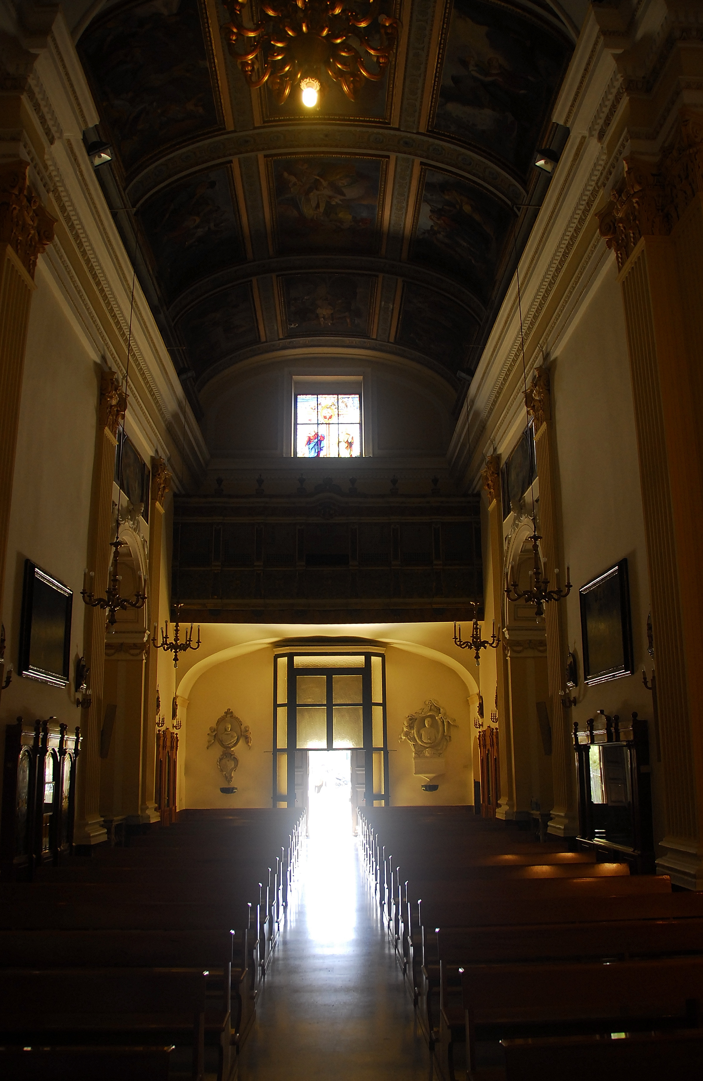 Palermo, ITA